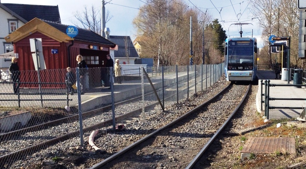 Holtet holdeplass på Ekebergbanen, Oslo.